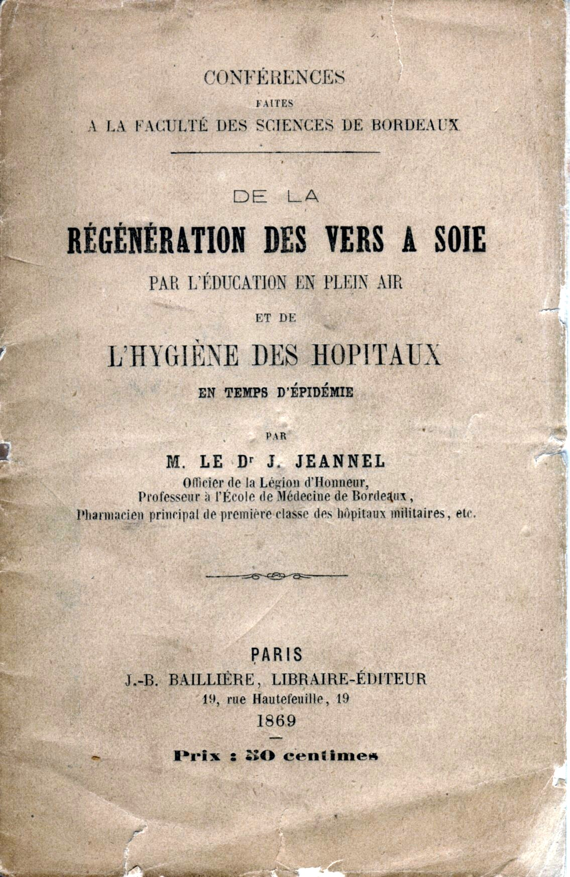 Conférences faites à la Faculté des sciences de Bordeaux De la régénération des vers à soie par l'éducation en plein air et de l'hygiène des hôpitaux en temps d'épidémie